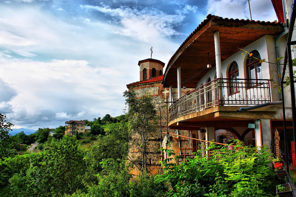 Манастирът Света Петка във Велгощи, Република Македония.